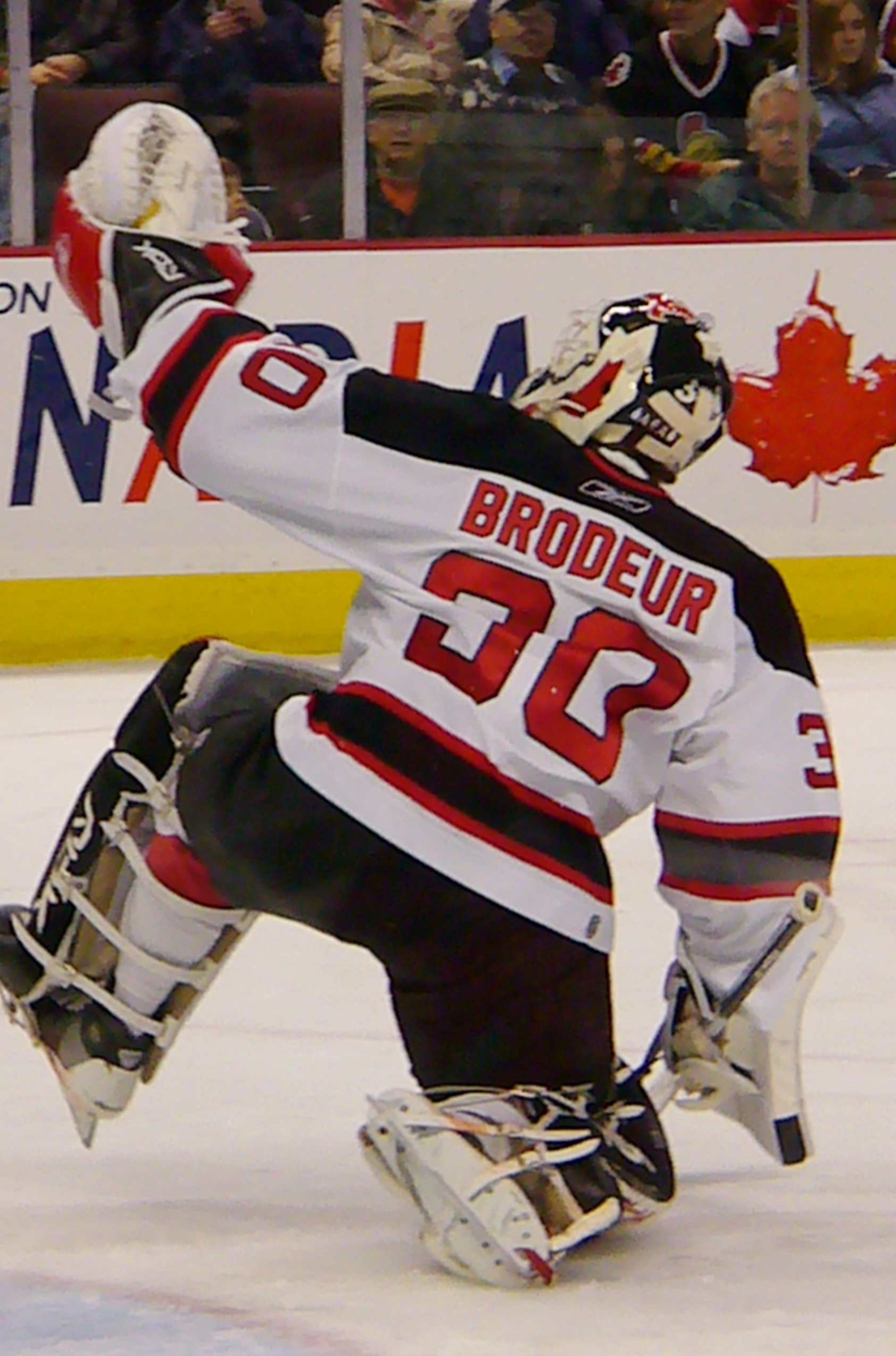 Martin Brodeur makes a save.